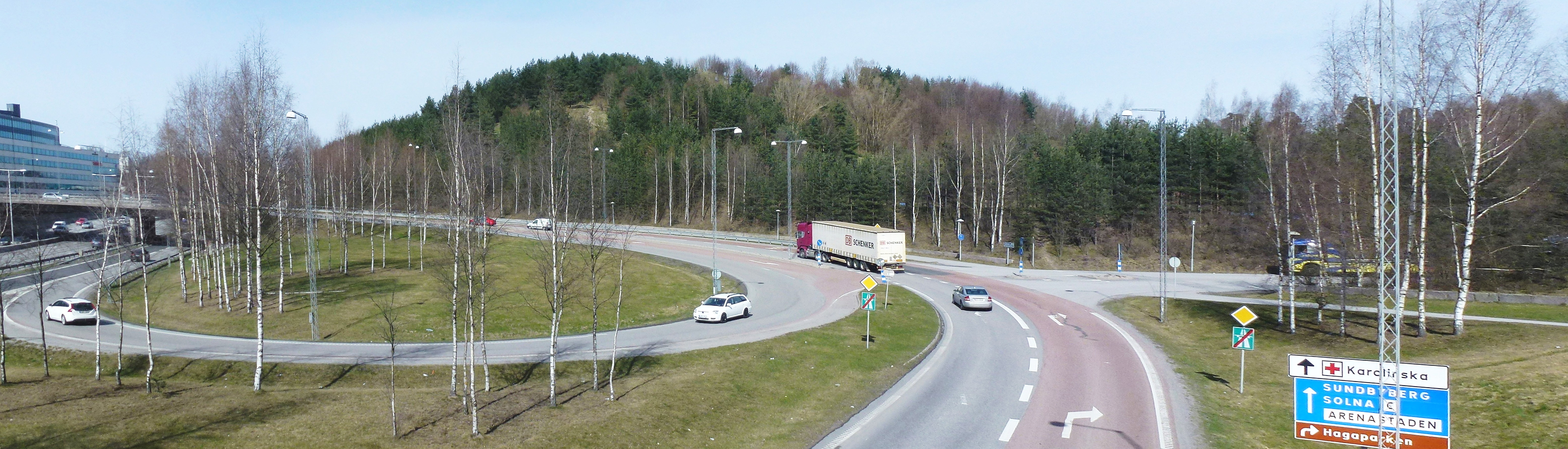 Haga kulle, vy mot norr